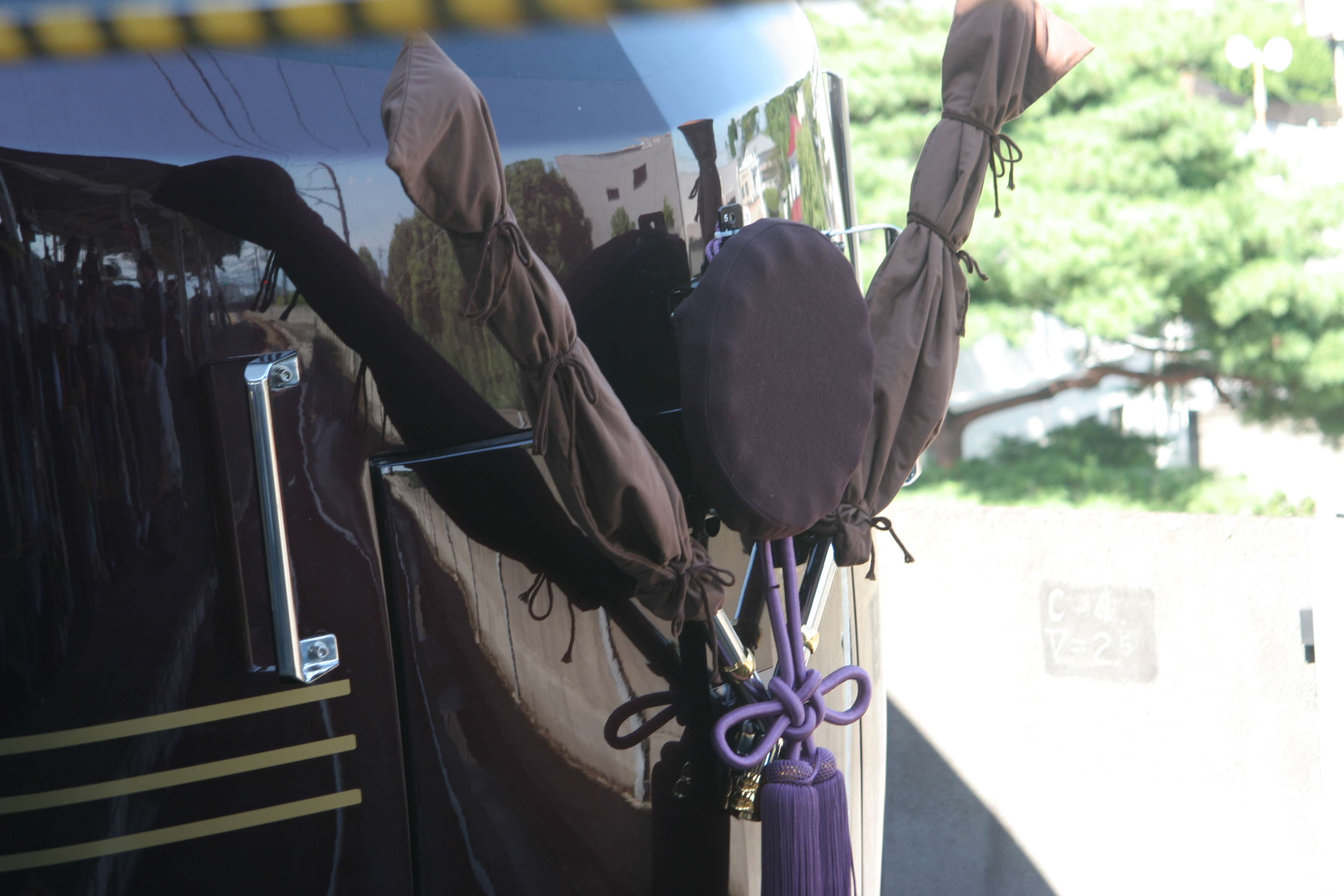 2010年9月26日に外房線で運転されたお召し列車。両陛下が御乗車でない時間は国旗及び御紋章は収納される